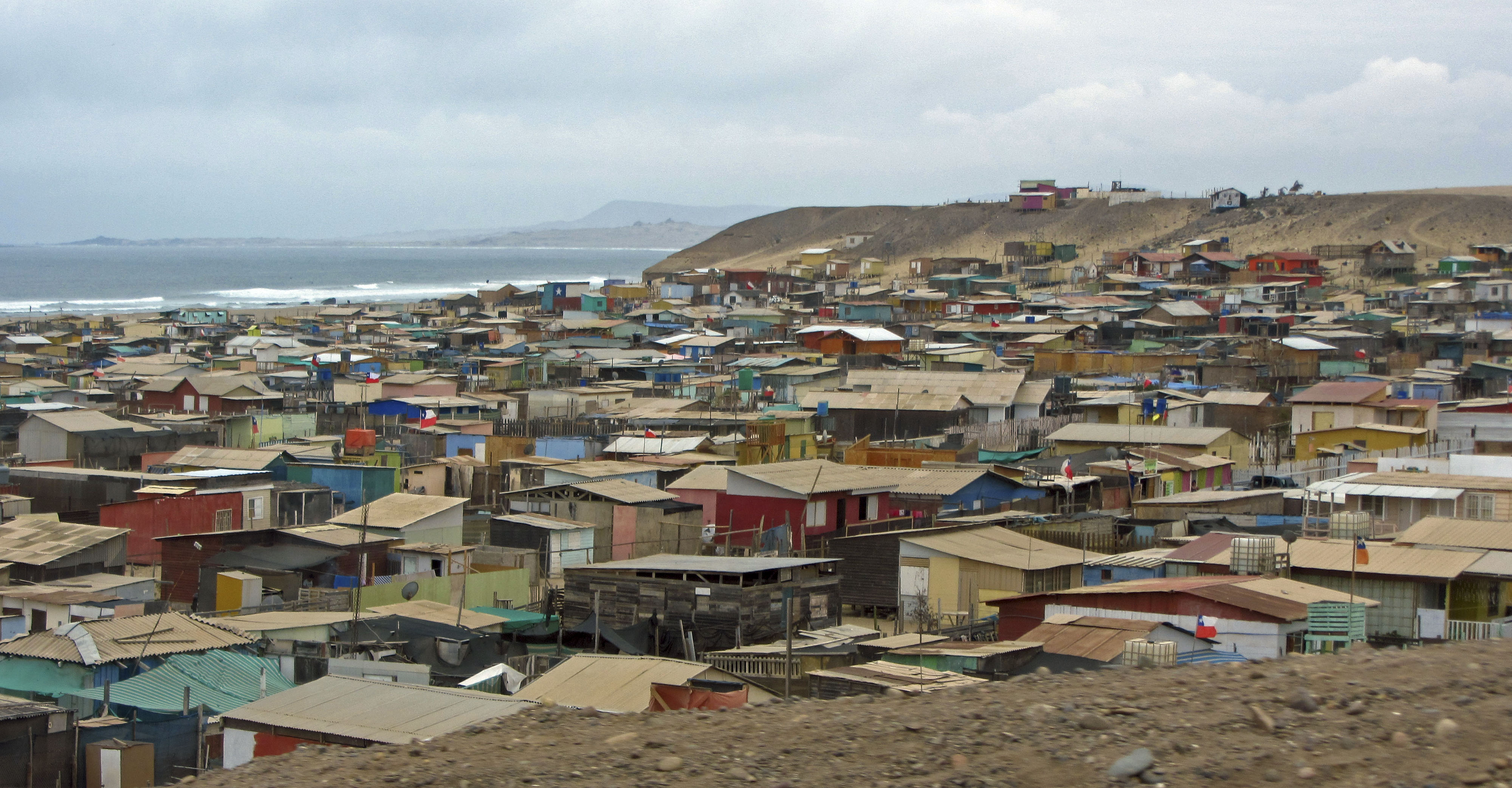 Puerto Viejo, localidad de comuna de Caldera, Región de Atacama, Chile Febrero de 2016